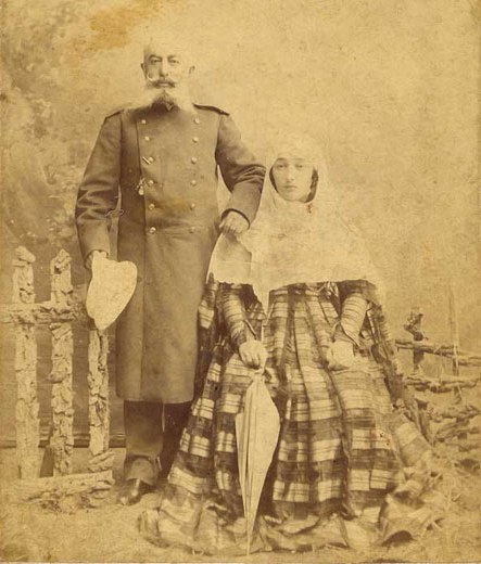 Тарковский Джамалутдин с супругой Патимат-бике